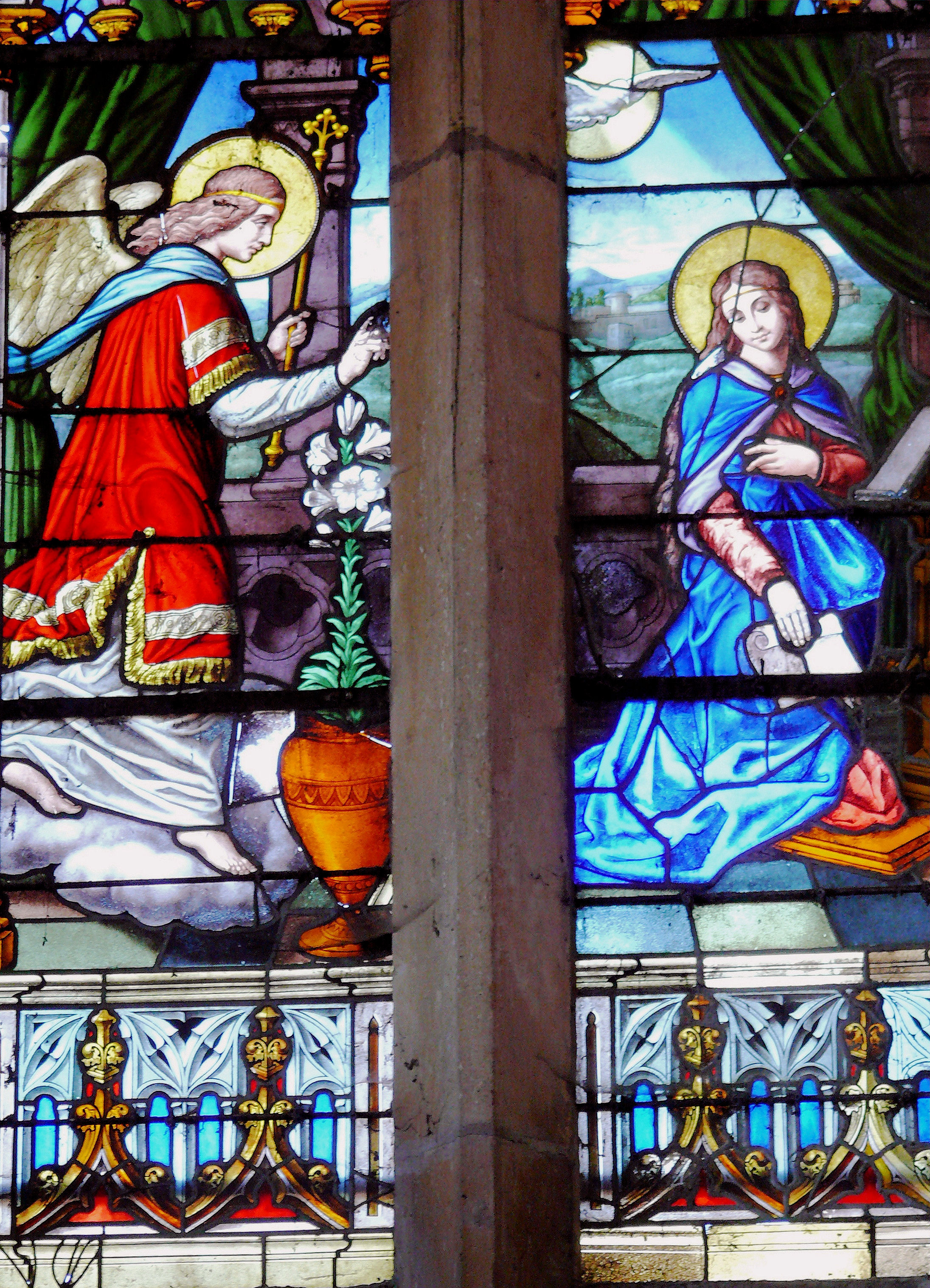 Rembercourt-Sommaisne - Vitrail de l'Annonciation (19e siècle)